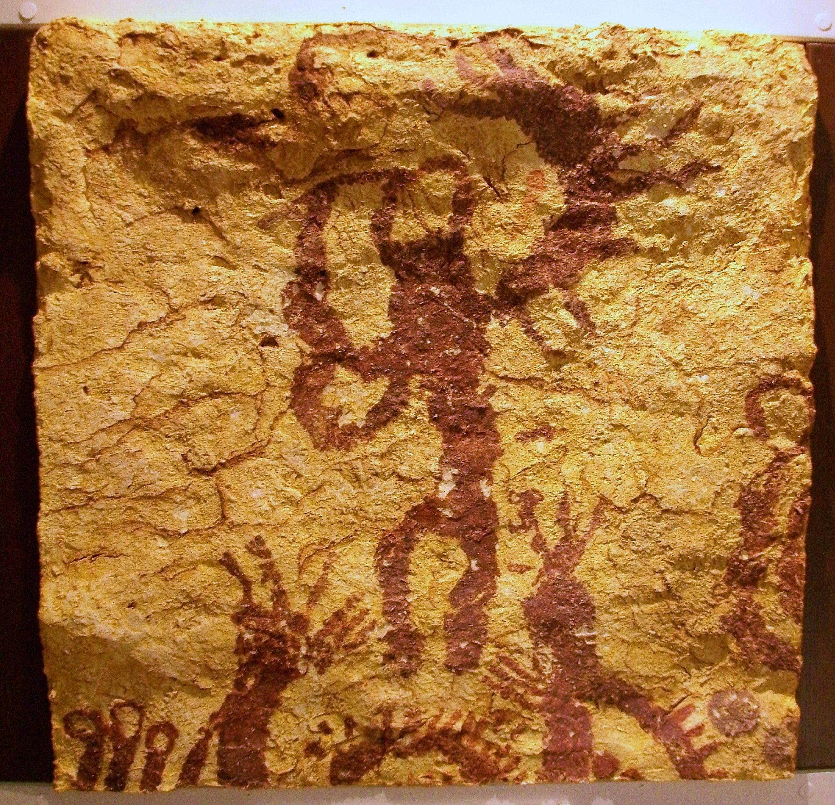 Reproducció de l'art macroesquemàtic del Pla de Petracos (Castell de Castells) al Museu Arqueològica de Gandia